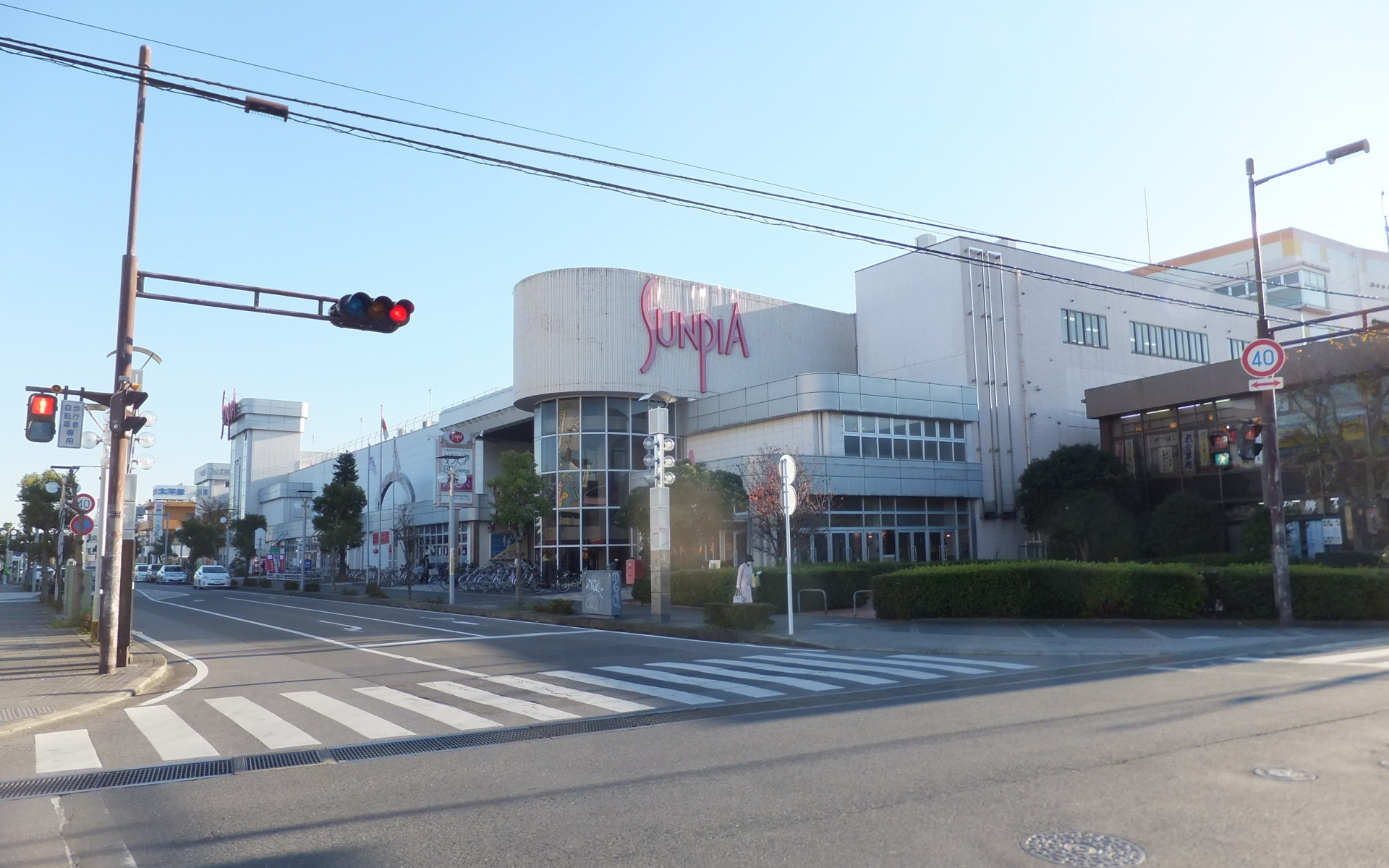 東金ショッピングセンター サンピア(千葉県東金市)